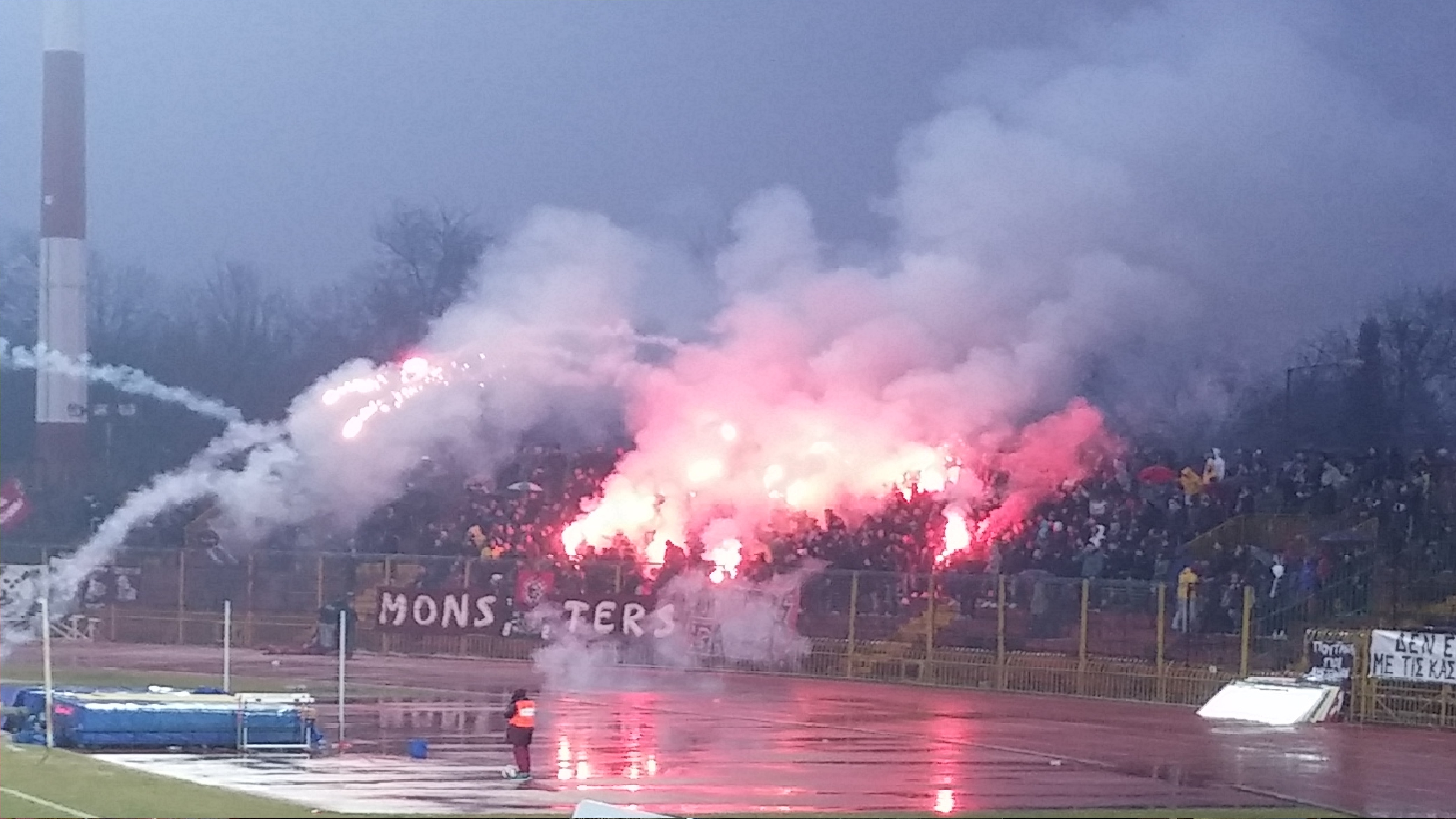 Mvskoke: Οπαδοί της ΑΕΛ στο στάδιο Αλκαζάρ το 2015